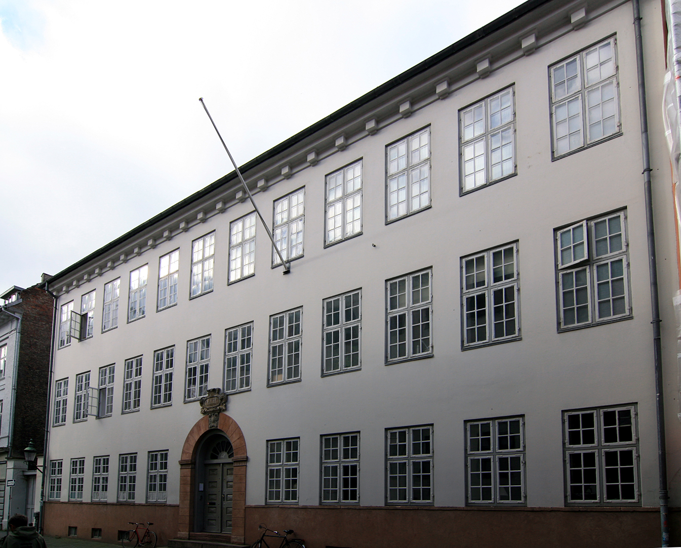 Borchs Kollegium, Store Kannikestræde, København. Bygget 1823. Fredet.